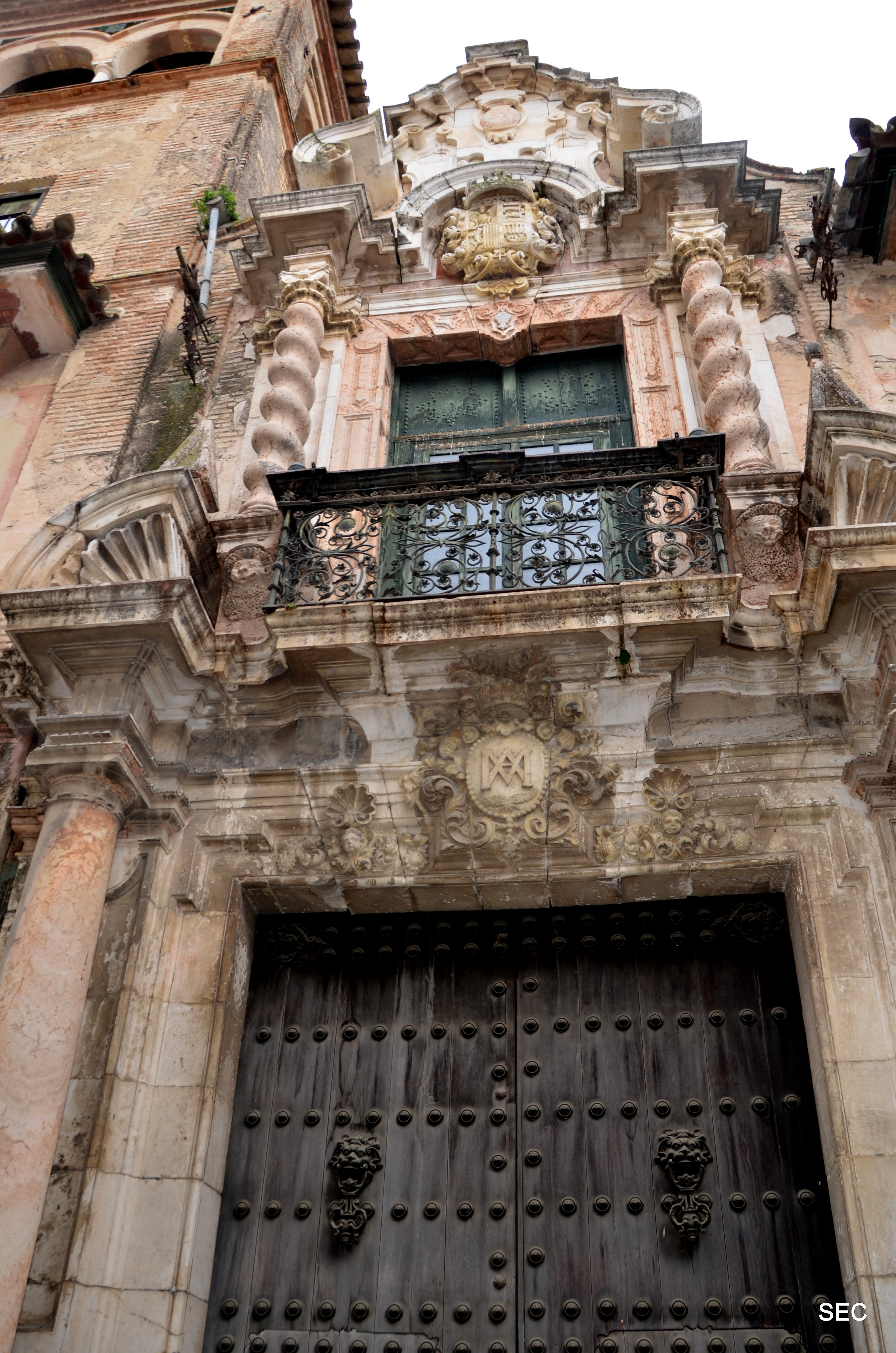 Écija, Palacio de Peñaflor Écija